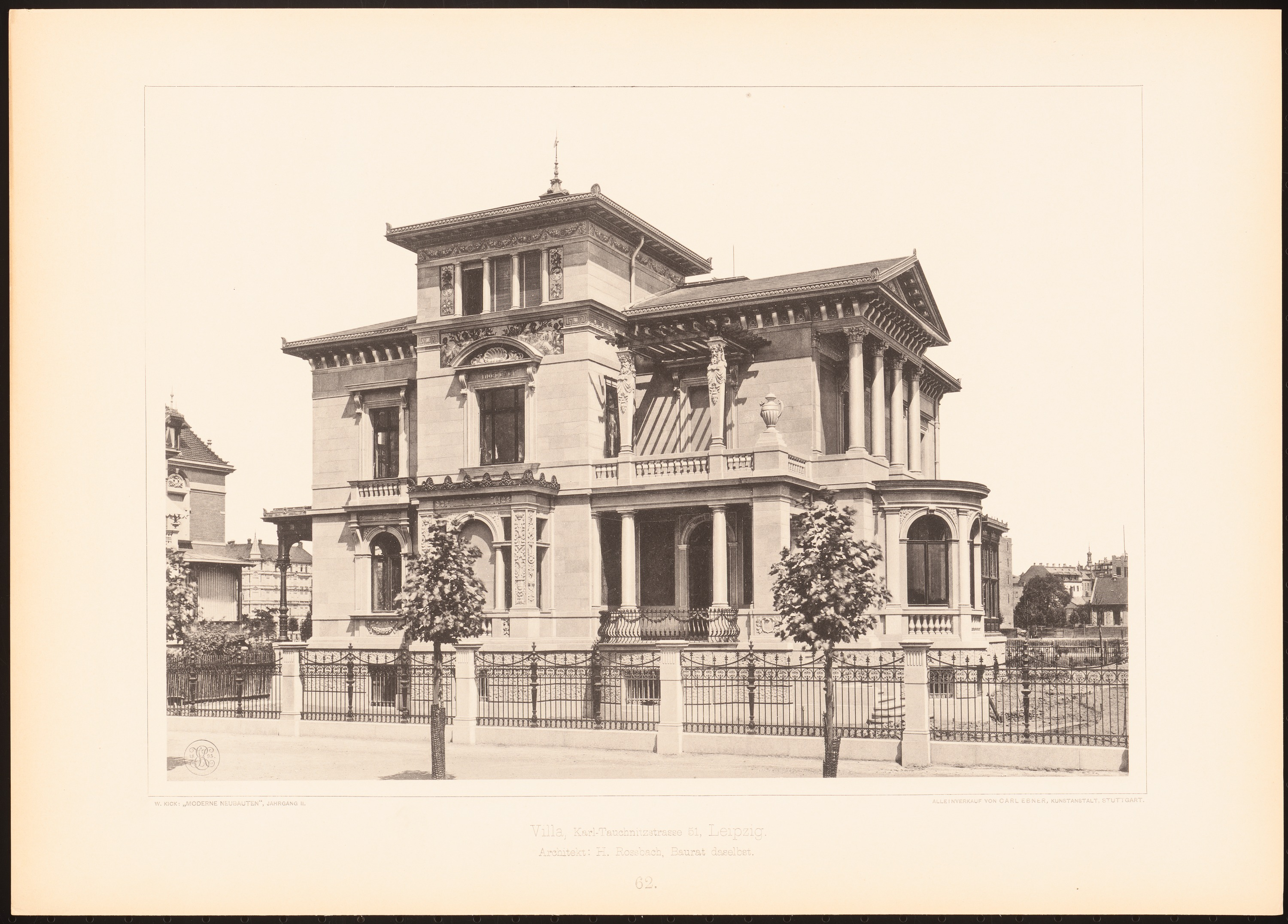 Villa Swiderski in Leipzig (Musikviertel), Karl-Tauchnitz-Straße 35 (ursprüngliche Hausnummer 51), nicht erhalten